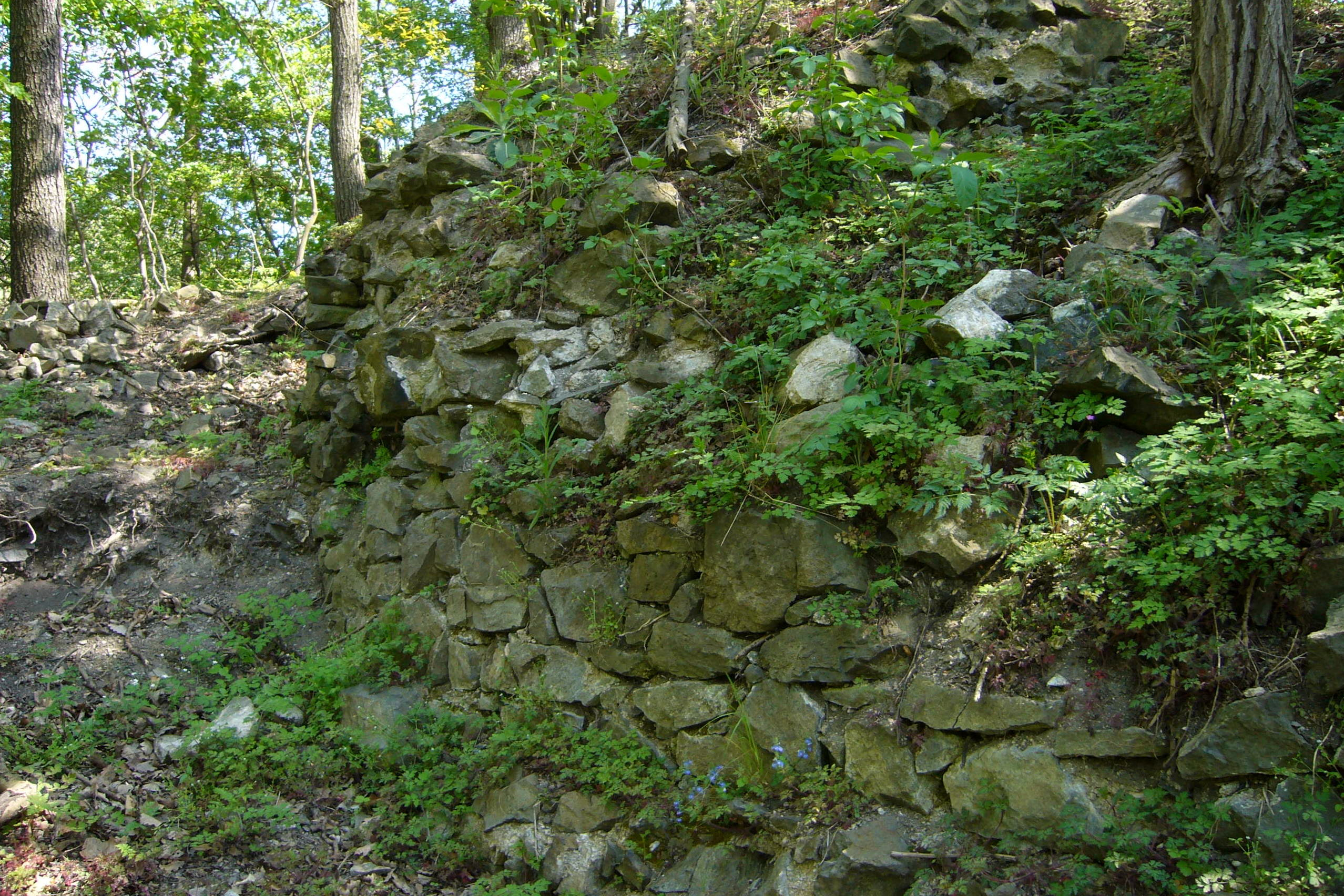 Mojžíř (Wessenstein) - dochované zdivo